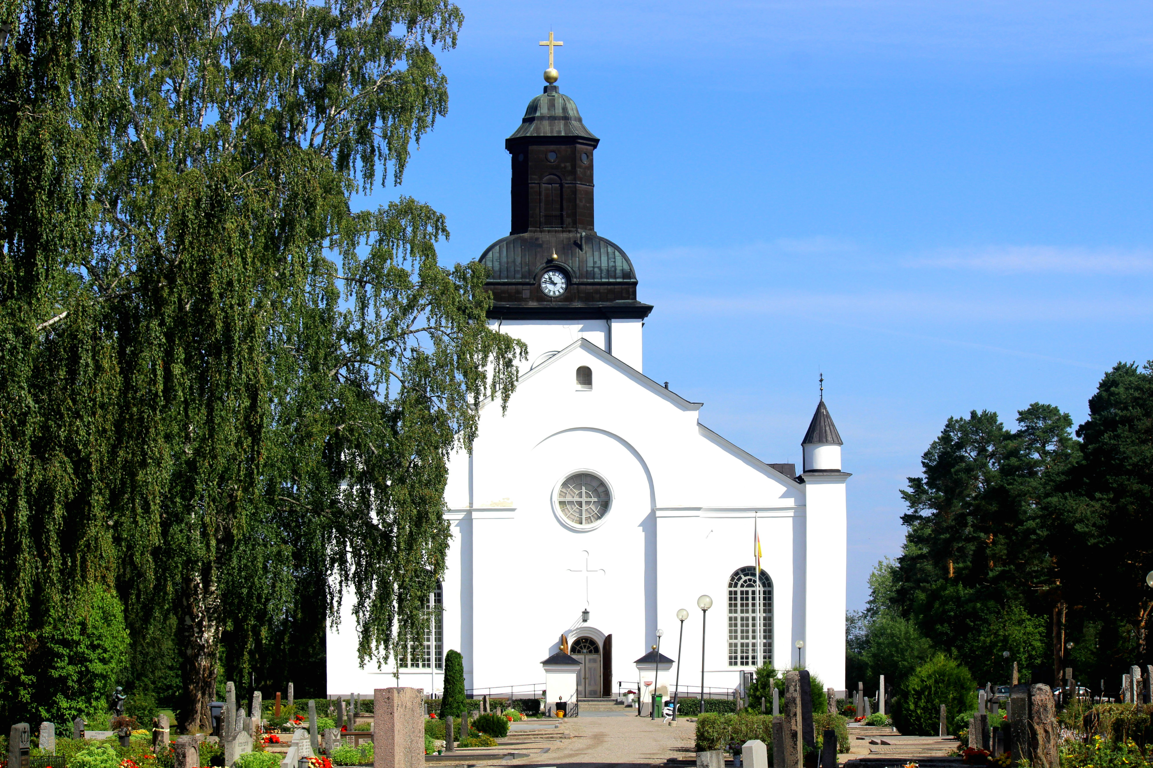 Järvsö kyrka